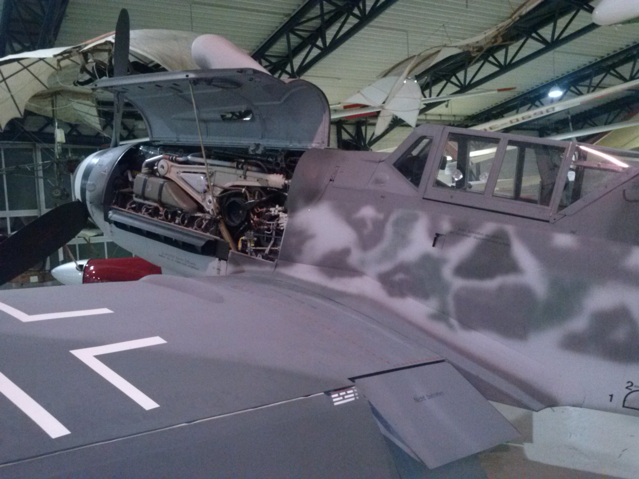 Messerschmidt Bf 109 Nachbau mit Originalteilen, teilweise mit Teilen eines abgestürzten Flugzeuges der Jagdgeschwaders 54